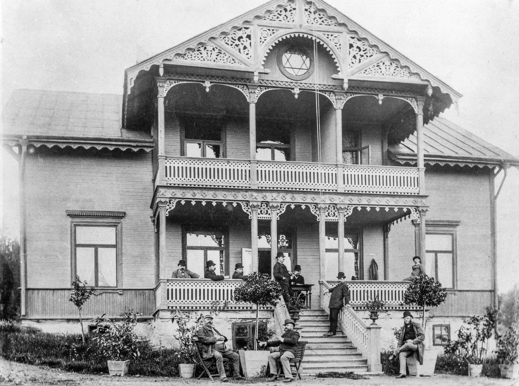 Villa Finedal, Lidingö. Villan med "gubbar" på verandan. Skannat gammlt foto.